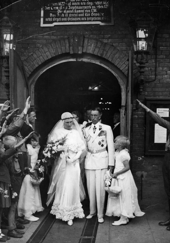 Hamburg, Trauung Theo Osterkamp, Fel Gudrun Pagge Trauung des Pour le Mérite Fliegers Theodor Osterkamp mit der Fliegerin Fel Gudrun Pagge in Hamburg-Eppendorf. Der deutsche Kronprinz [Wilhelm], Ministerialrat Christiansen, Hauptmann Loenzen waren zugegen. Abgebildete Personen: Osterkamp, Theodor: Generalmajor, Ritterkreuz (RK), Luftwaffe, Orden Pour le mérite, Deutschland (GND 124745822)